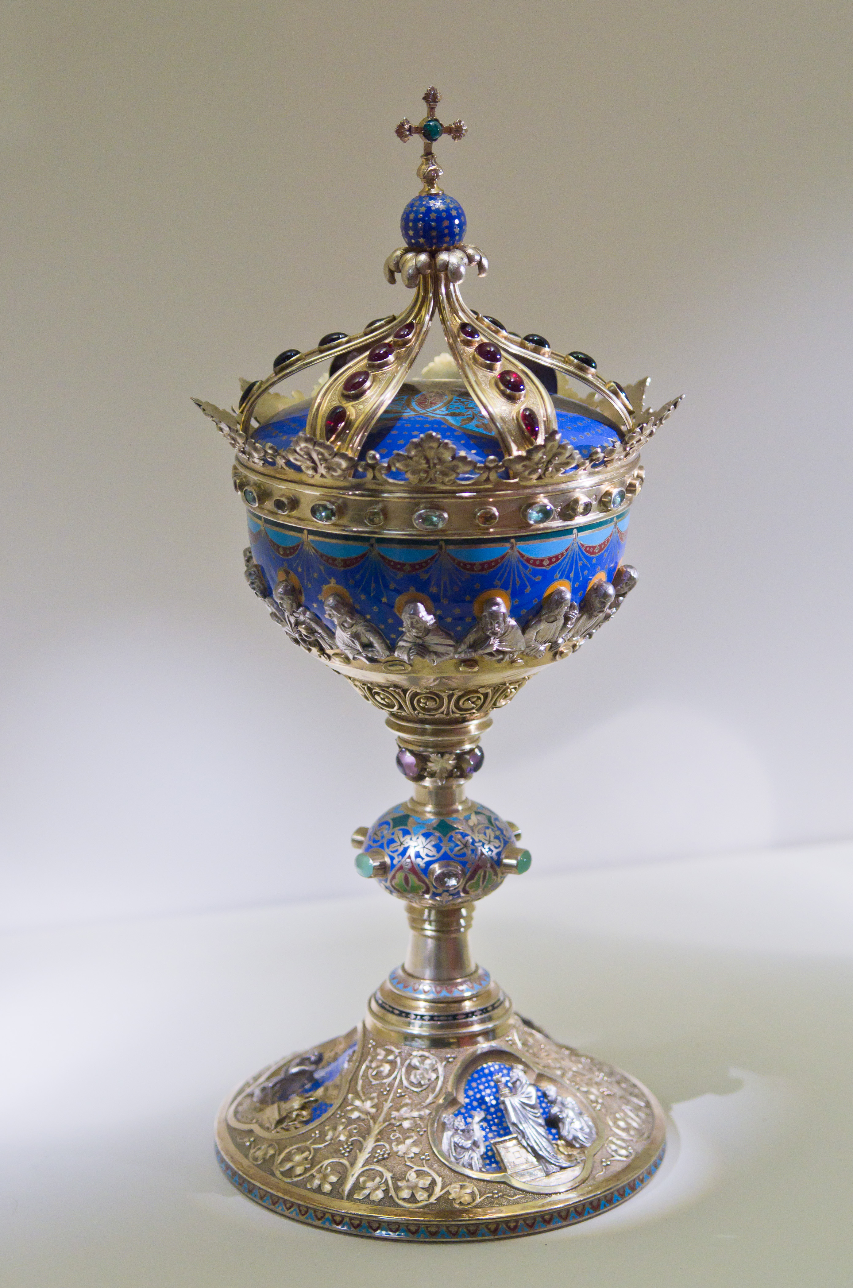 Ciboire de Poussièlgue-Rusand, exposé au petit palais modèle crée en 1950